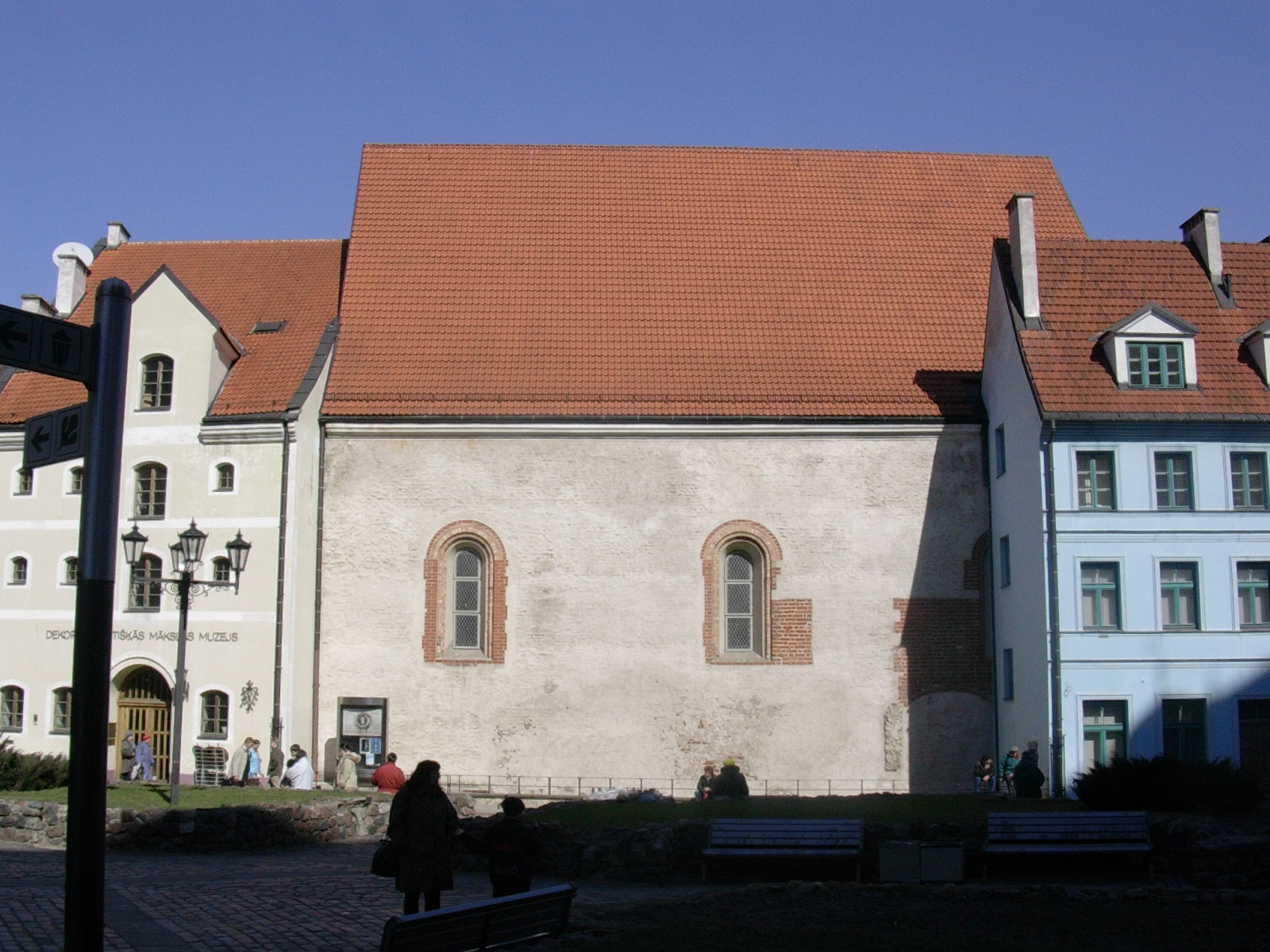 Jura baznīca (Dekoratīvi lietišķās mākslas muzejs).